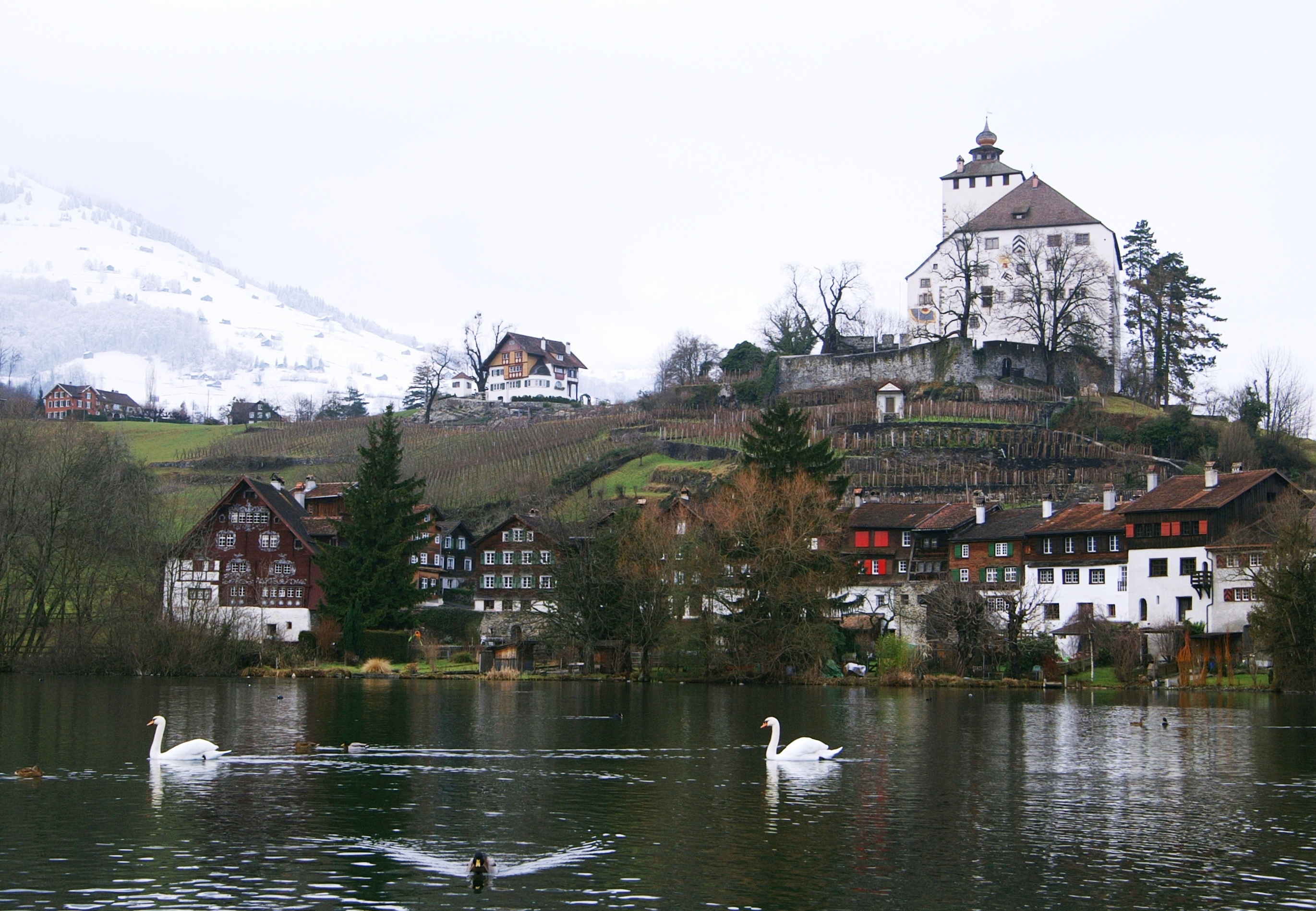 Schloss und Burgstädtchen Werdenberg im Schweizer Rheintal in Grabs.